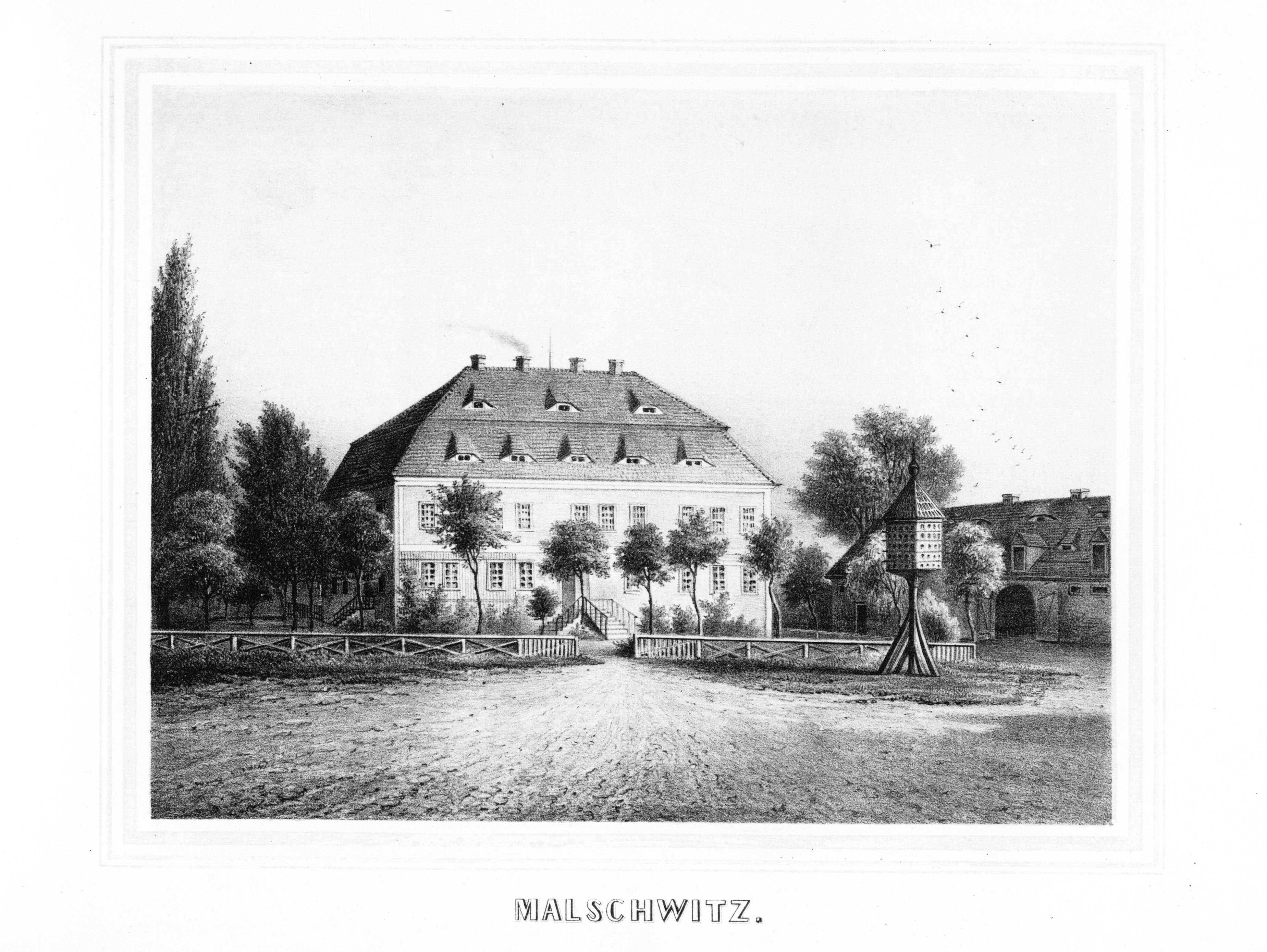 Malschwitz aus: Album der Rittergüter und Schlösser im Königreiche Sachsen Markgrafenthum Oberlausitz Section: III